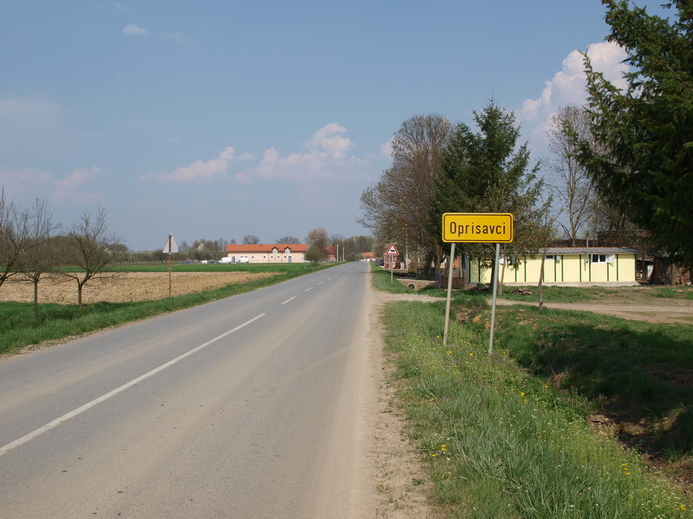 Ulaz u selo Oprisavci, Brodsko-posavska županija.